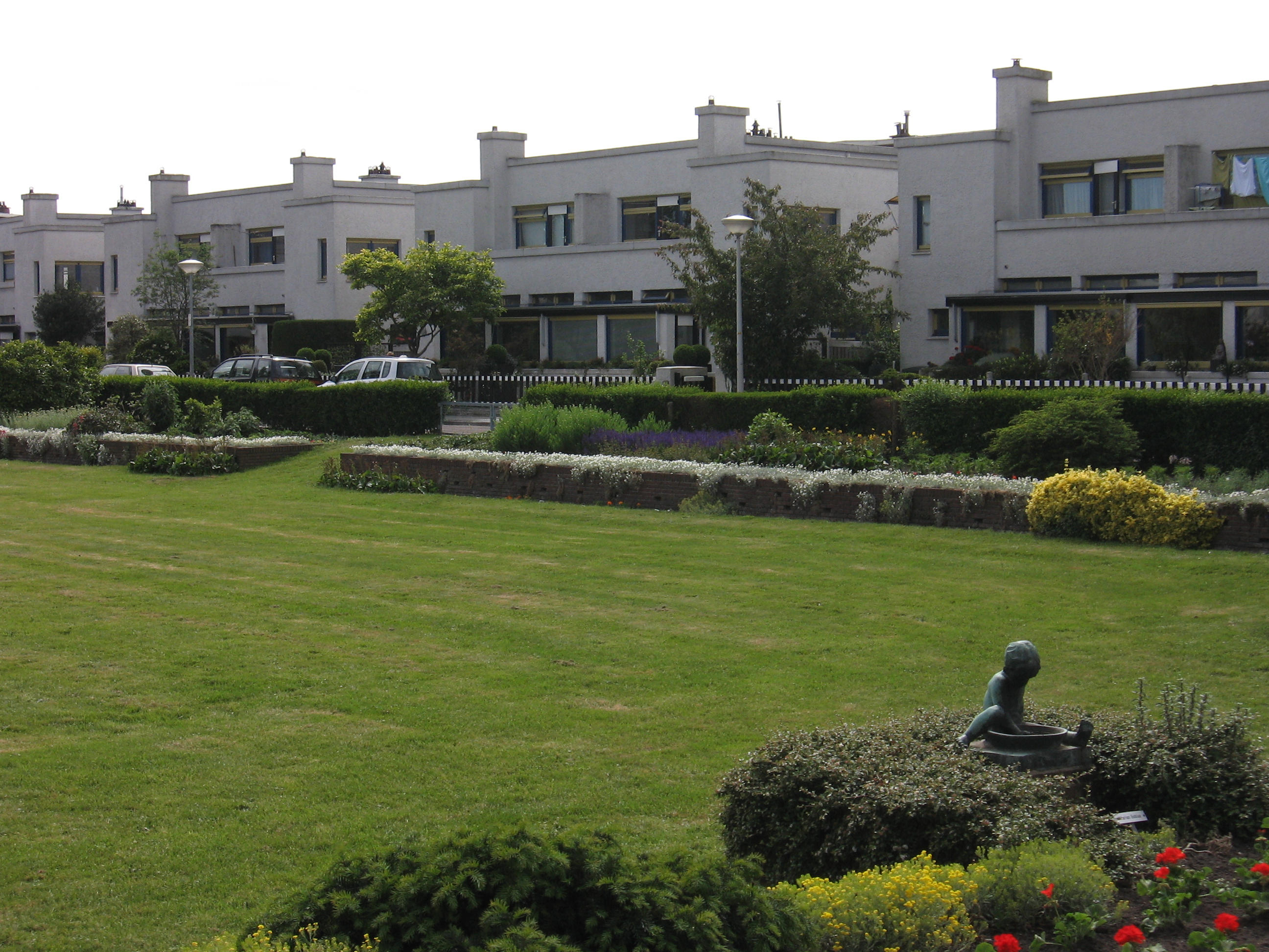 Papaverhof, Den Haag, mei 2007